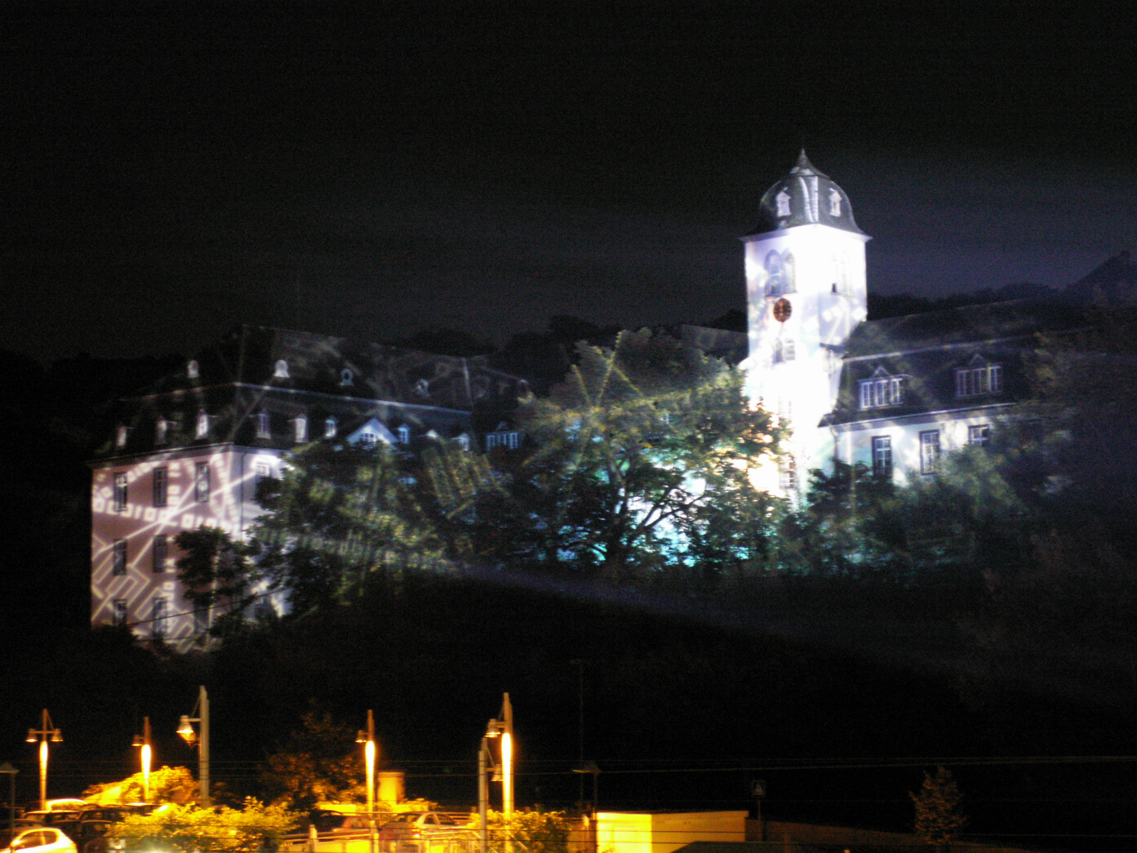 Lichtinstallation über Kloster Marienberg von Ingo Bracke zur rheinpartie 09